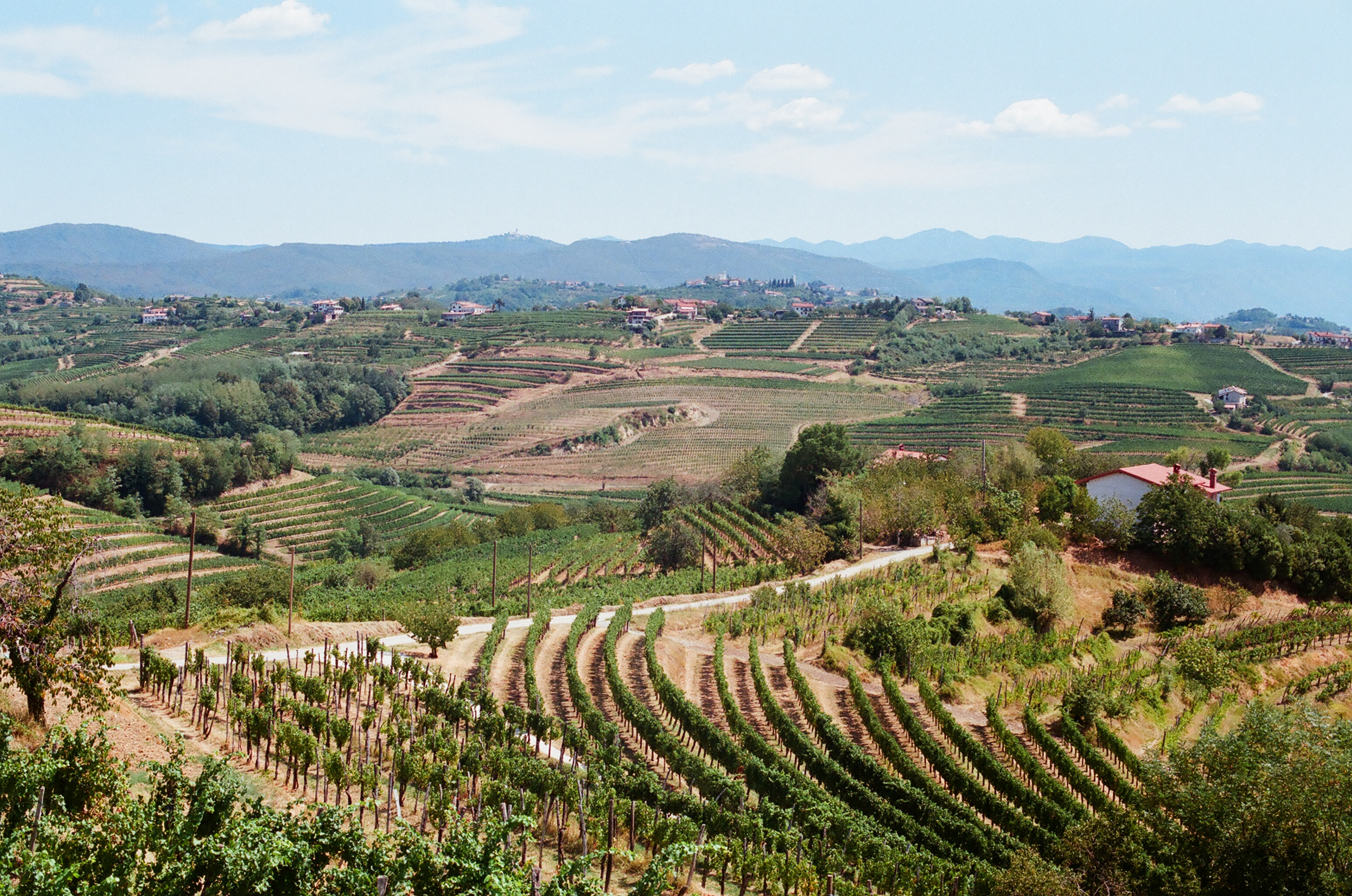 Goriška Brda